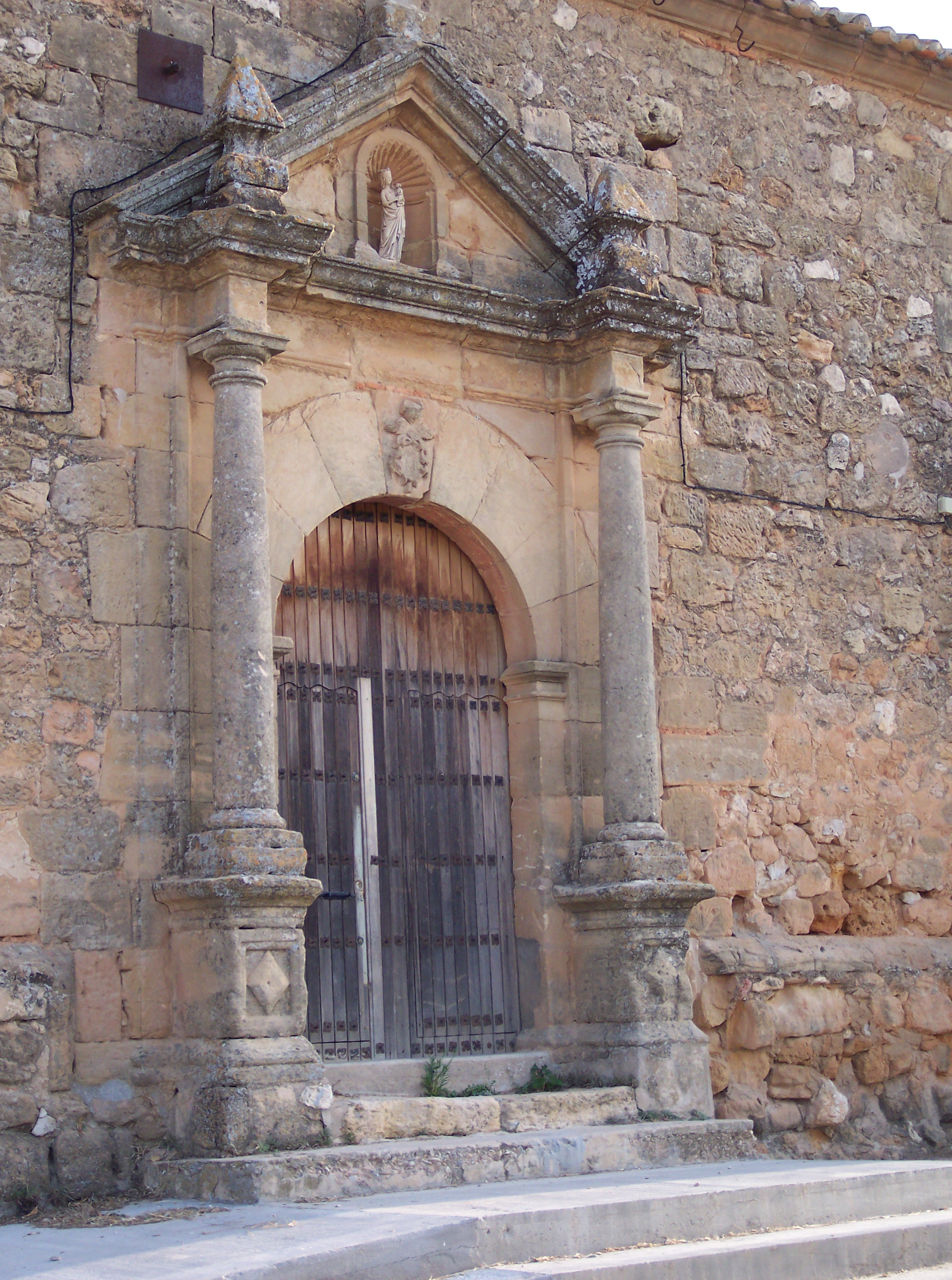 Puerta de la iglesia, Olivares de Júcar, Cuenca, España